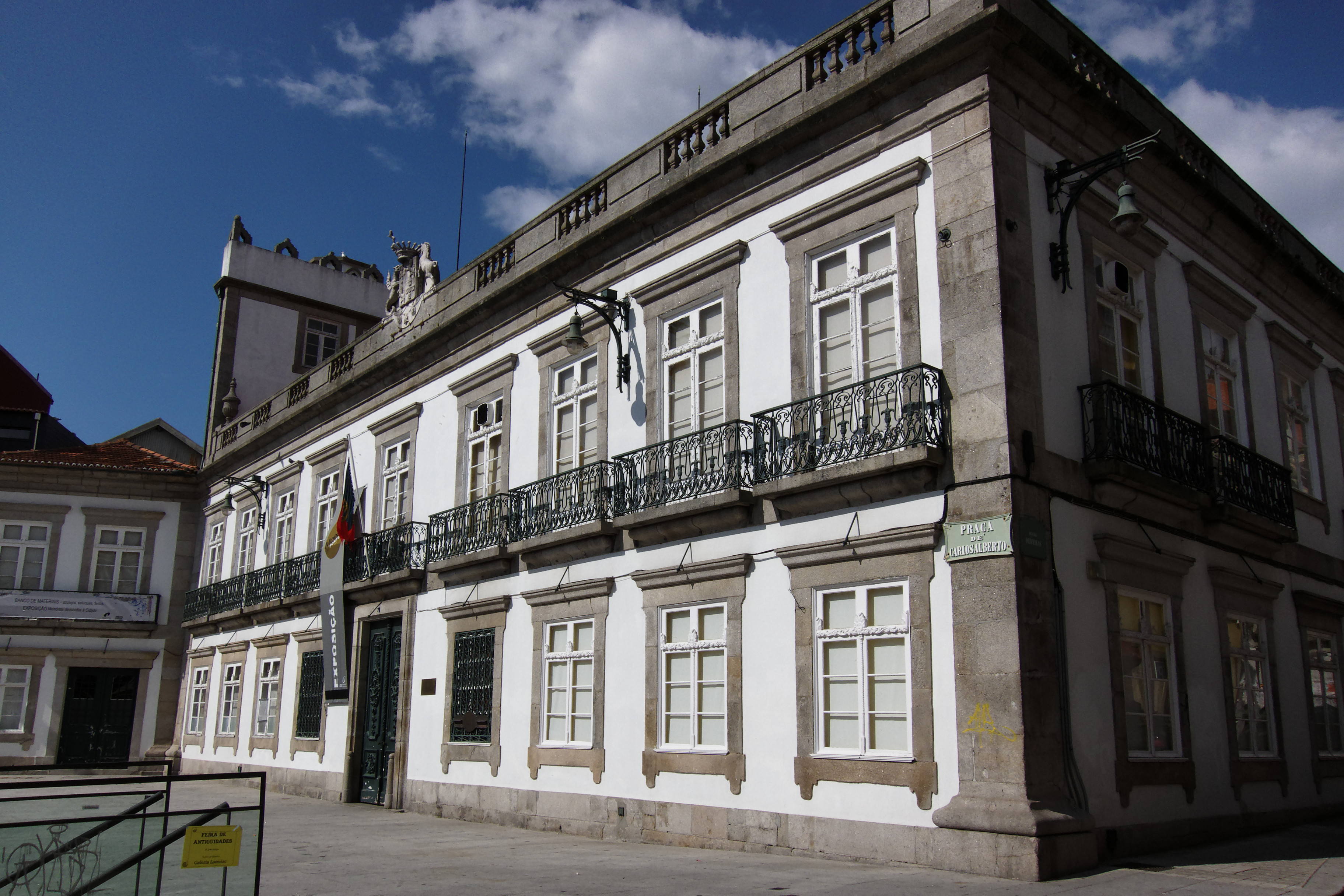 Palacete de los Vizcondes de Balsemão, ubicado frente a la plaza de Carlos Alberto. Oporto, Portugal.